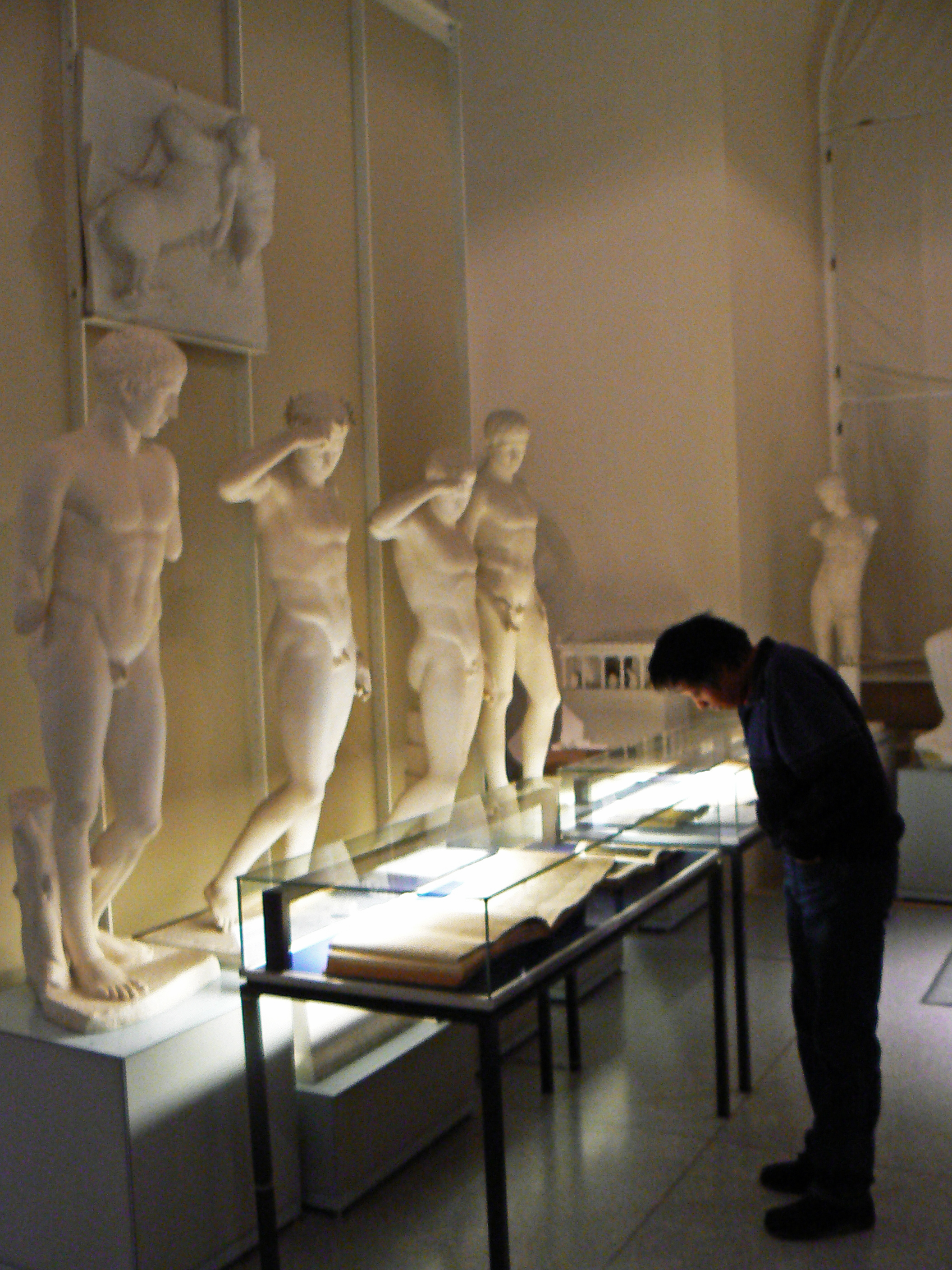 Fünf Personen in Betrachtung einer Vitrine im MUT (Museum der Uni Tübingen) auf dem Tübinger Schloss